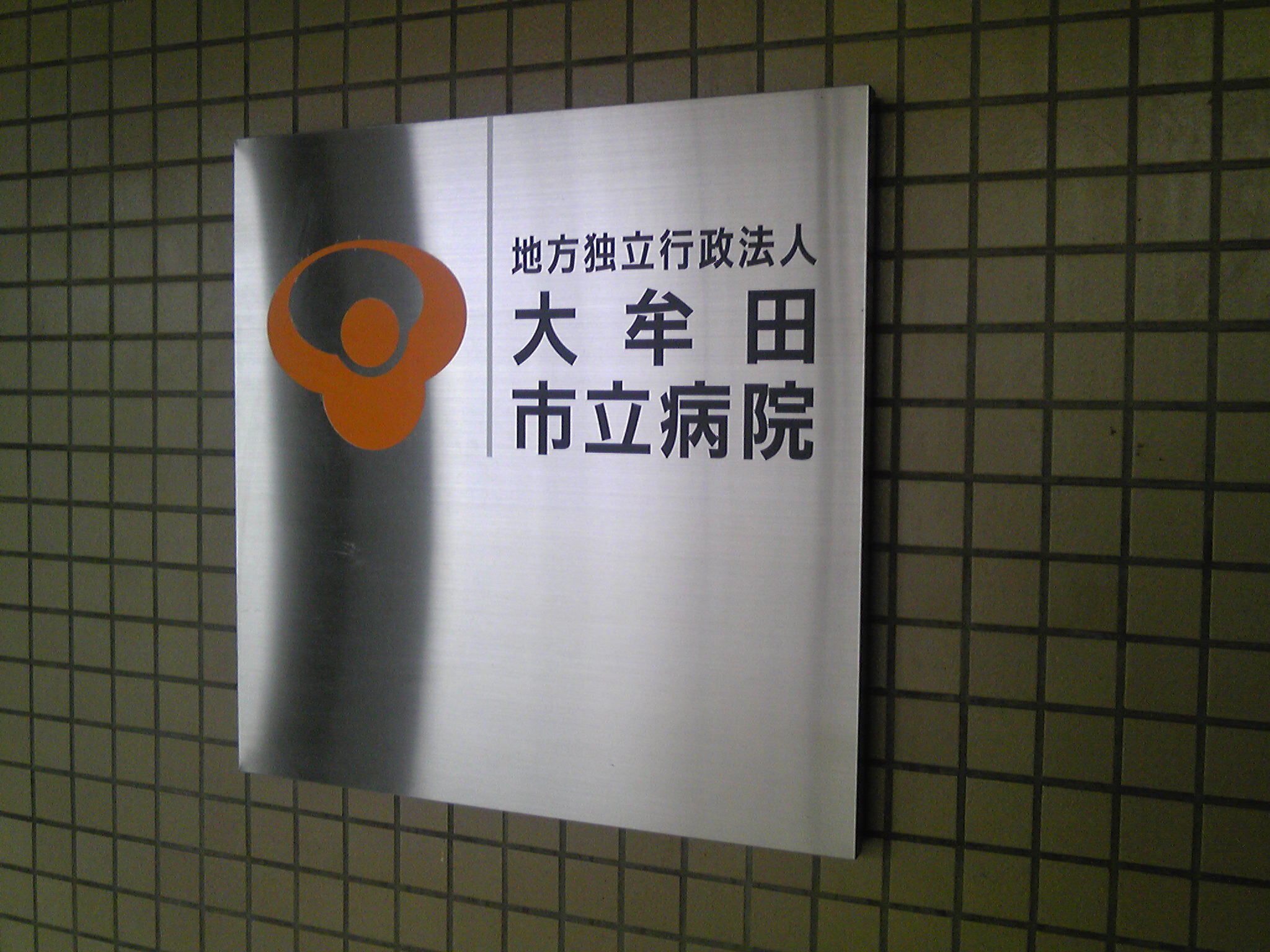 大牟田市立病院（福岡県大牟田市）の看板